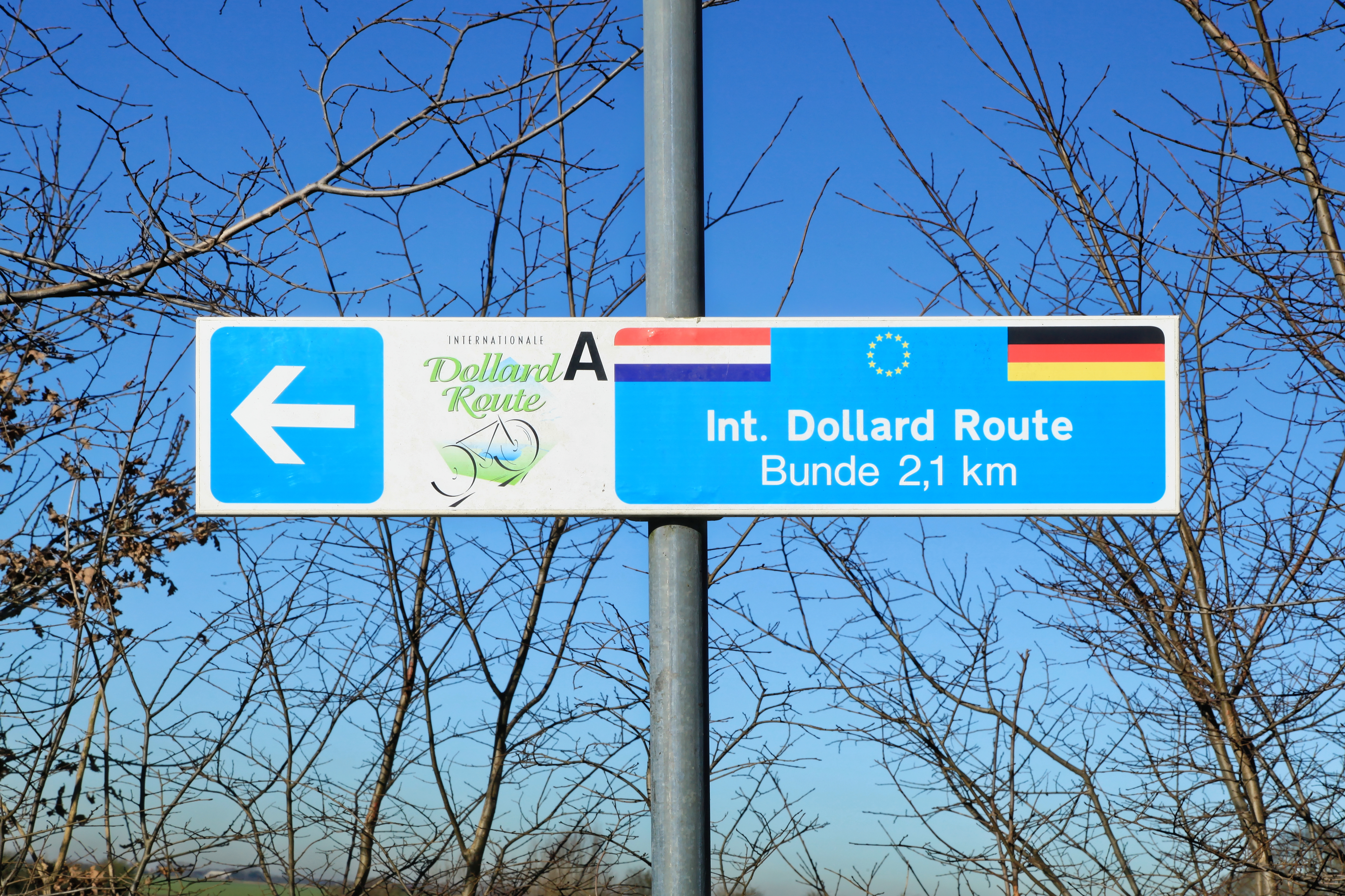 Steinhausstraße in Bunde (Germany)